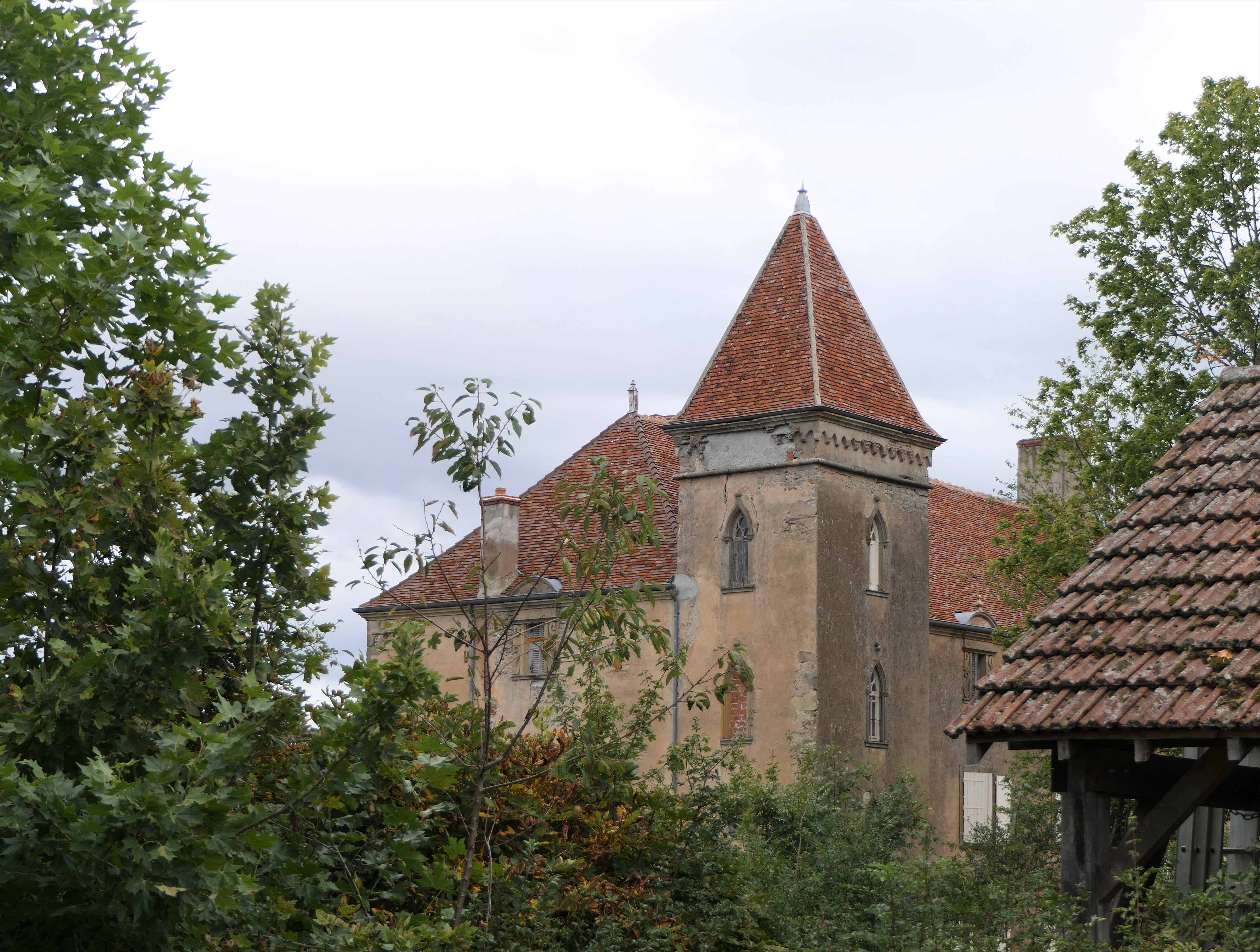 Vaudebarrrier,, château de Molleron